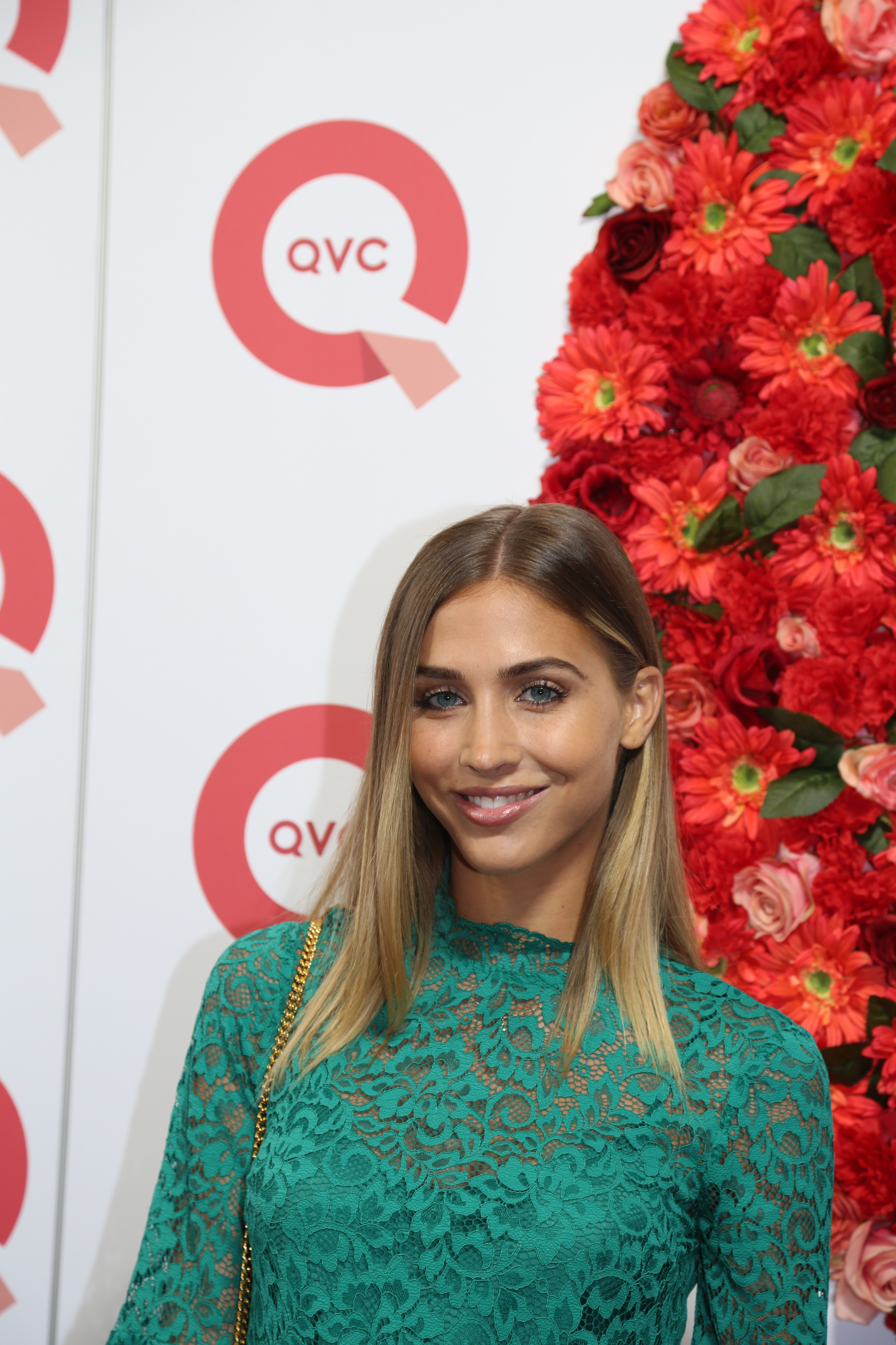 Ann-Kathrin Brömmel beim QVC Fashion-Event zur "VOGUE Fashion's Night Out", am 08.09.2017 in Düsseldorf.